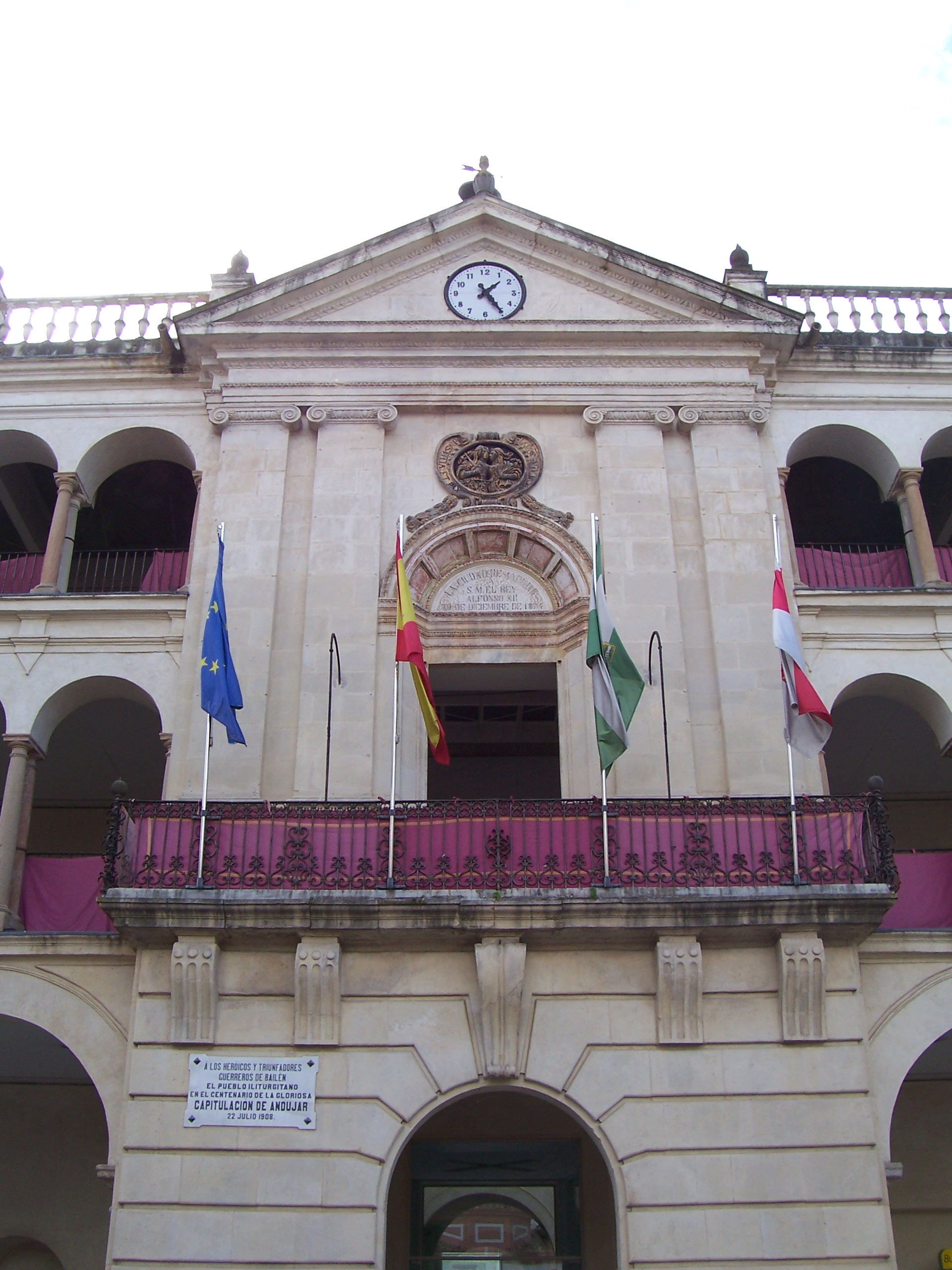 Fachada del Ayuntamiento de Andújar, en Jaén (España)